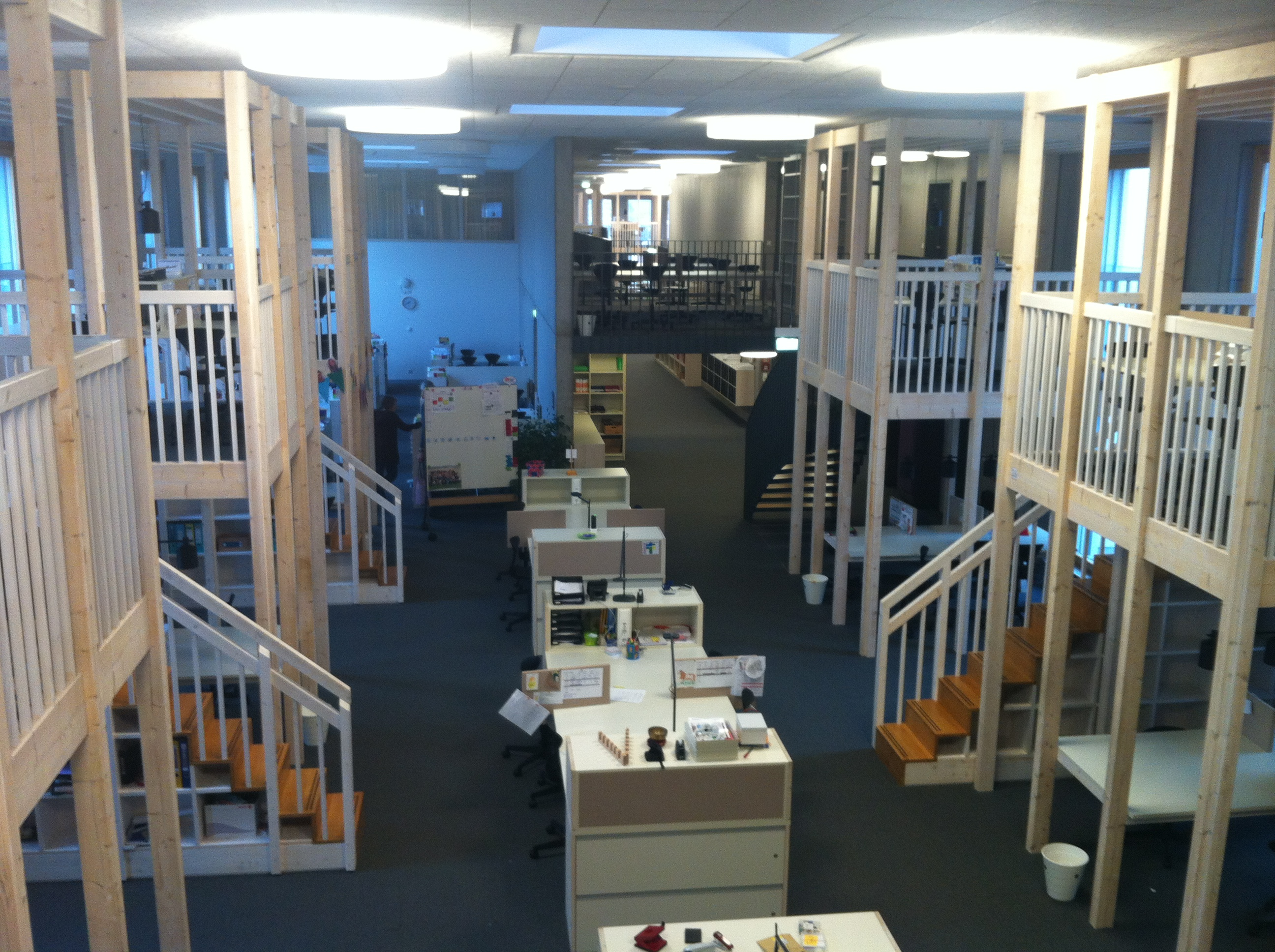 Innenbereich Weißes Haus der Alemannenschule (Gemeinschaftsschule) in Wutöschingen im Landkreis Waldshut in Baden-Württemberg.